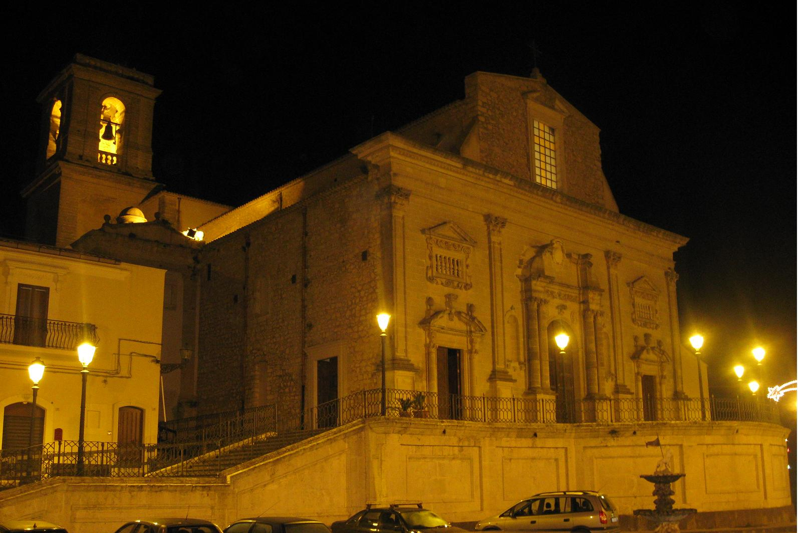 Prospetto e campanile della basilica chiesa madre di Licodia Eubea.